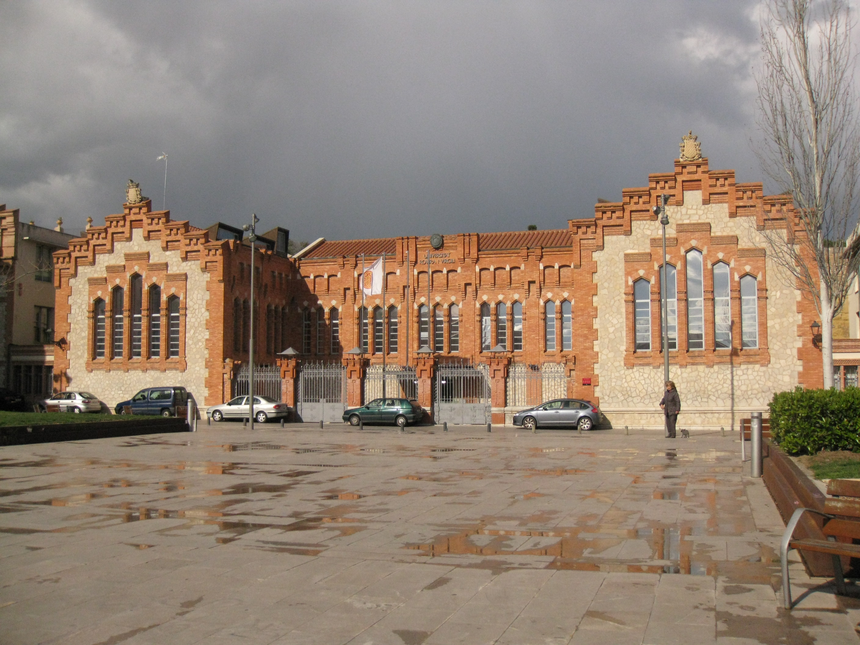 Escorxador municipal (Tarragona)